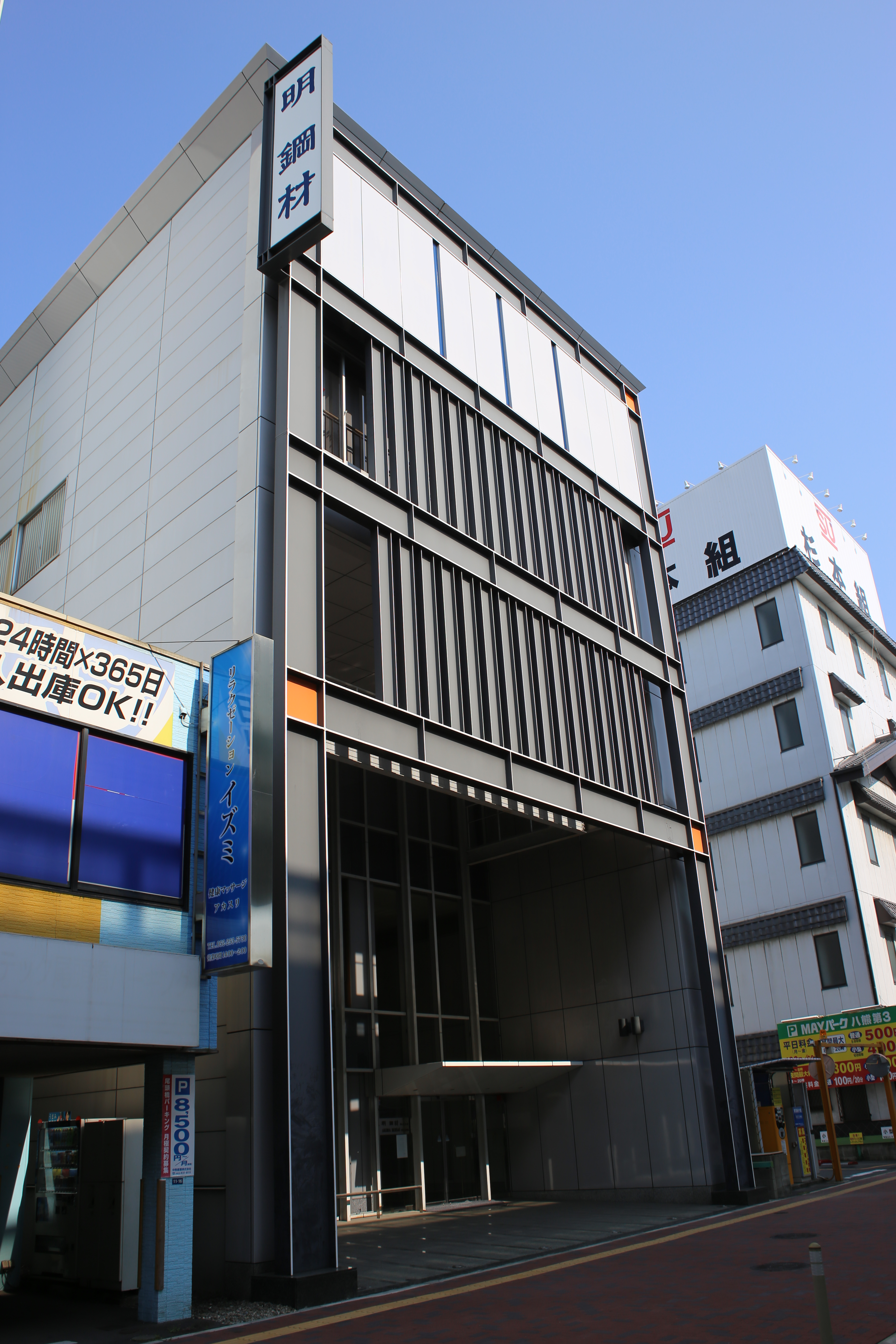 名古屋市中川区八熊一丁目の明鋼材本社を西側公道北側より撮影